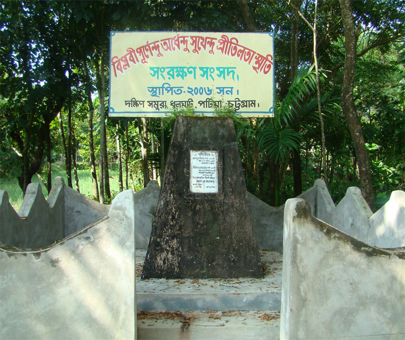 প্রীতিলতা ও অর্ধেন্দু দস্তিদারের স্মৃতিতে অর্ধেন্দু দস্তিদারের বড় ভাই পূর্ণেন্দু দস্তিদার এই শহীদ মিনার নির্মান করেন।